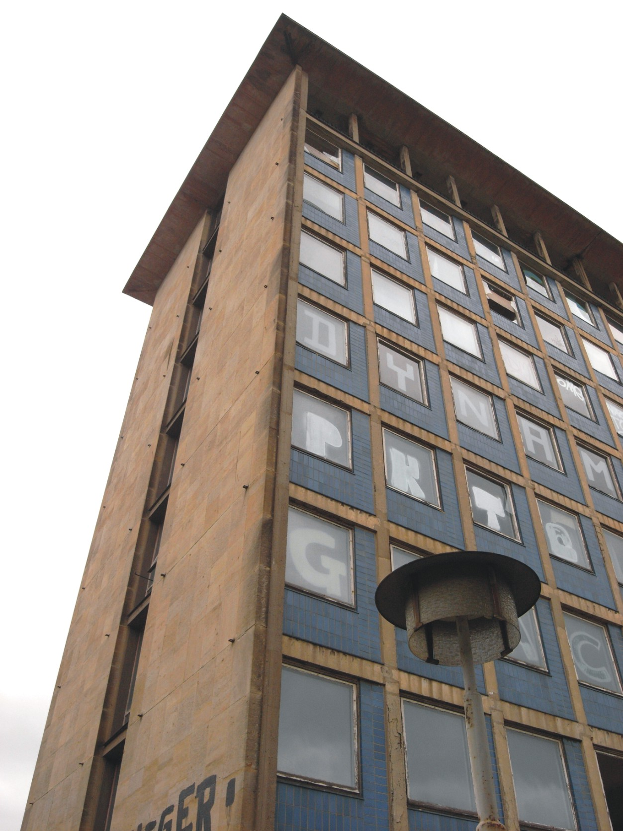 Gebäude des ehemaligen Zentralen Forschungsinstituts für Arbeit Dresden (Sachsen, Deutschland)